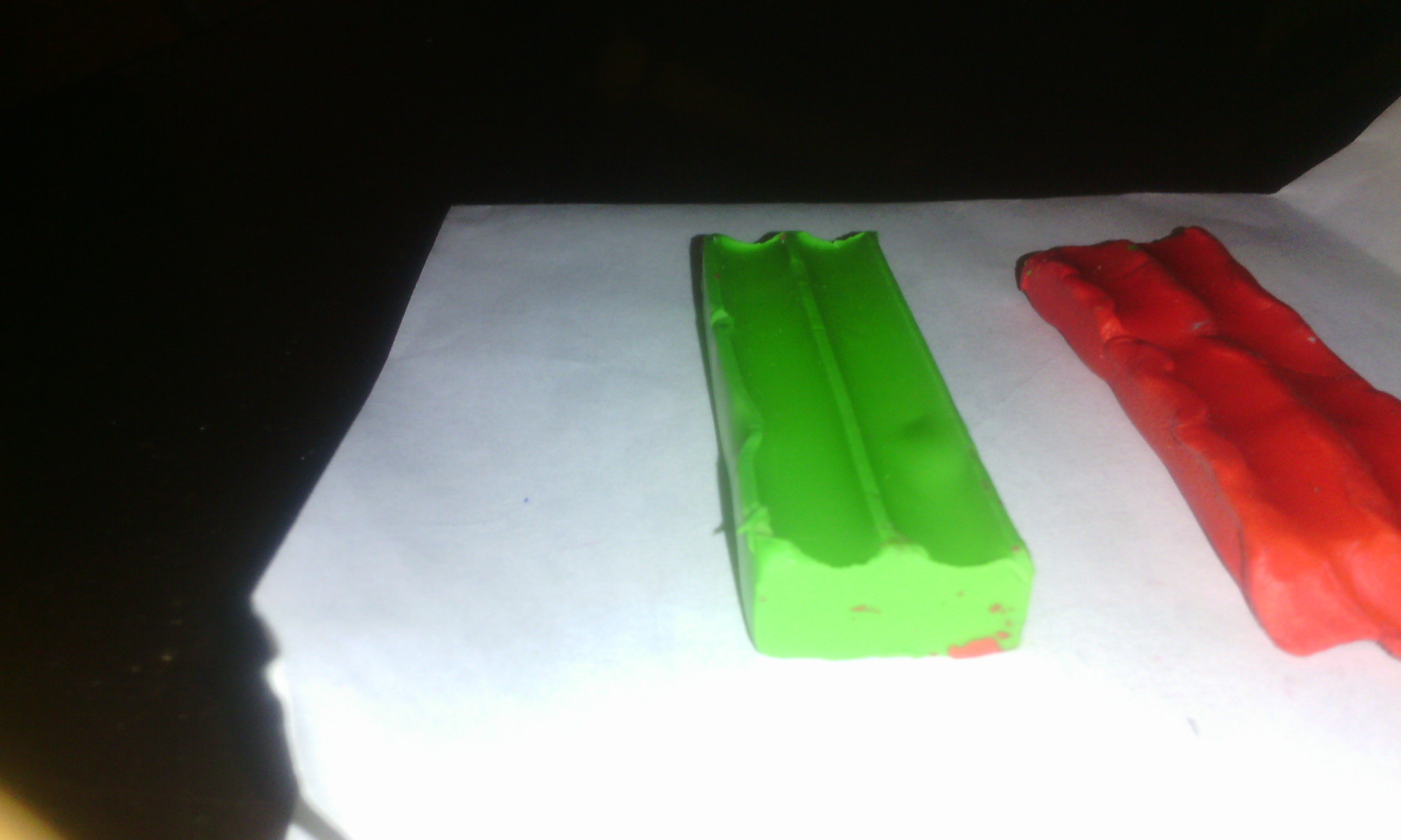 Пластилин,который я сделал сам